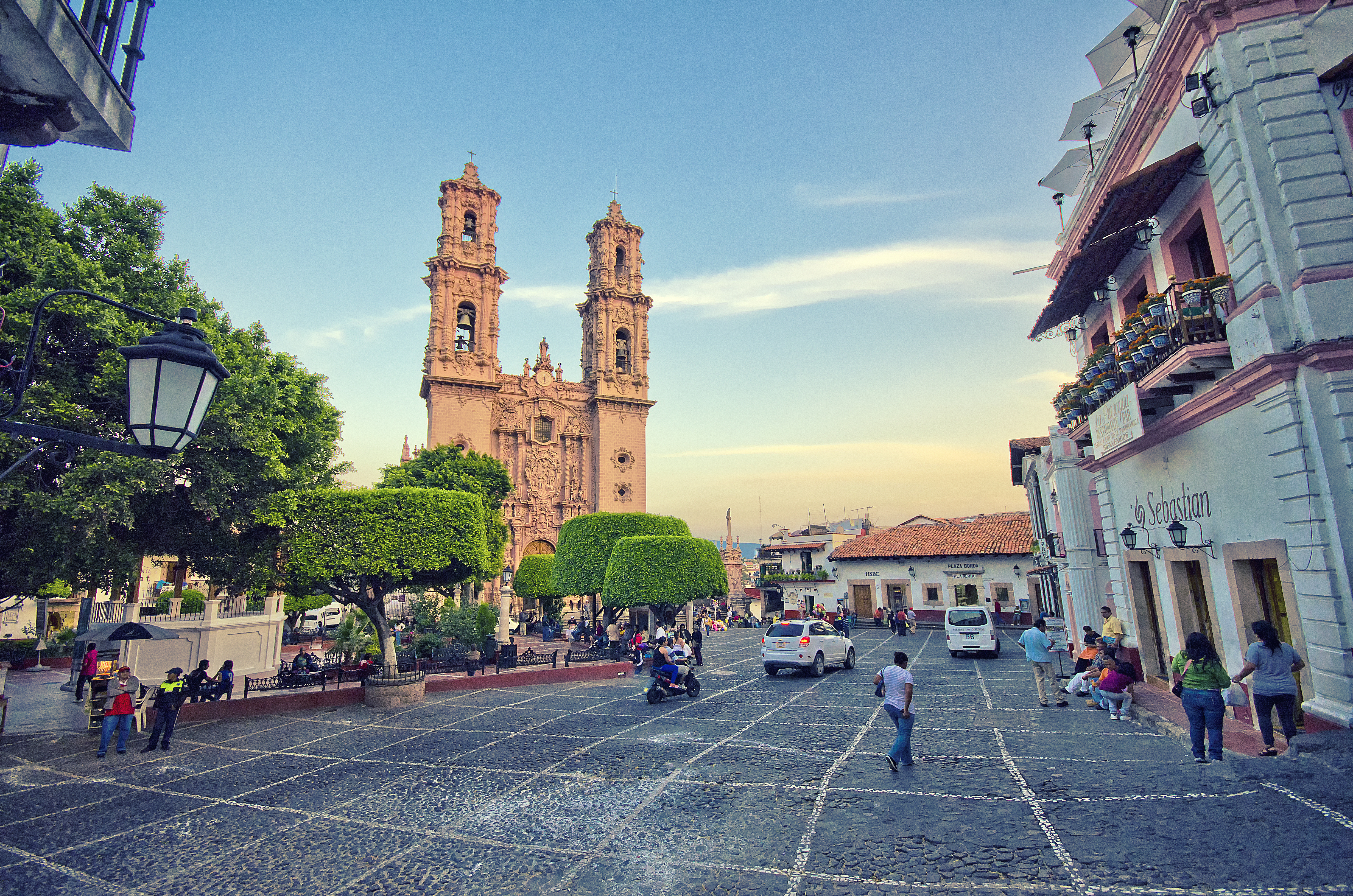 Centro de Taxco, Guerrero/ Taxco Center, Guerrero